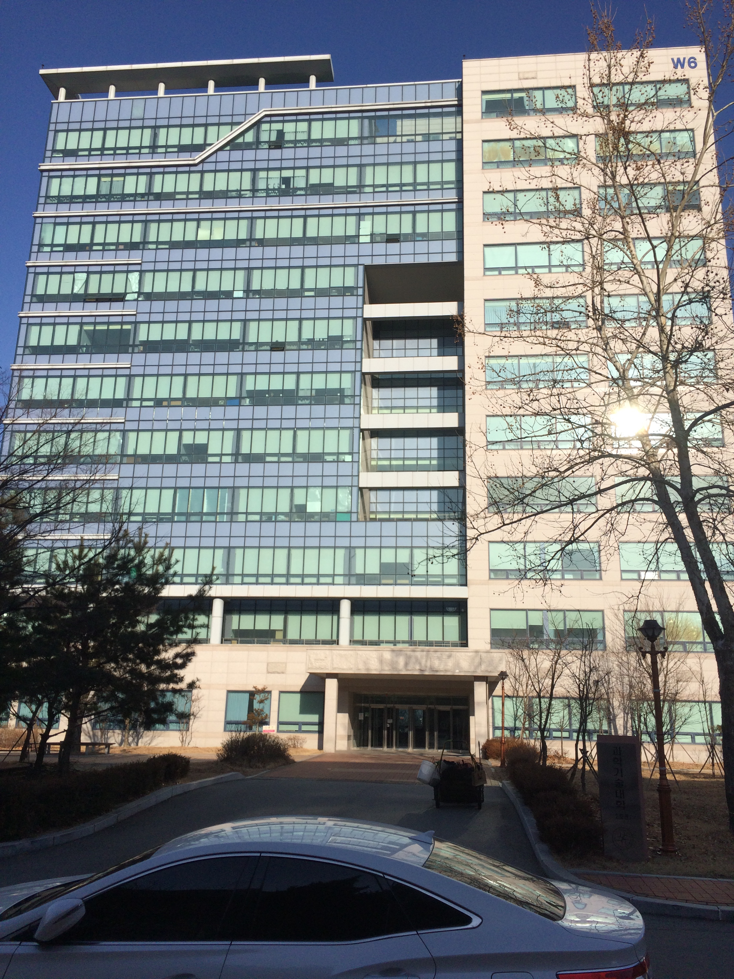 강릉원주대학교 원주캠퍼스에 위치한 과학기술대학2호관 건물. 과학기술대학 소속 학과의 전공 수업과, 교양 강의, 교수들의 각종 연구 등이 이루어지는 건물이다.